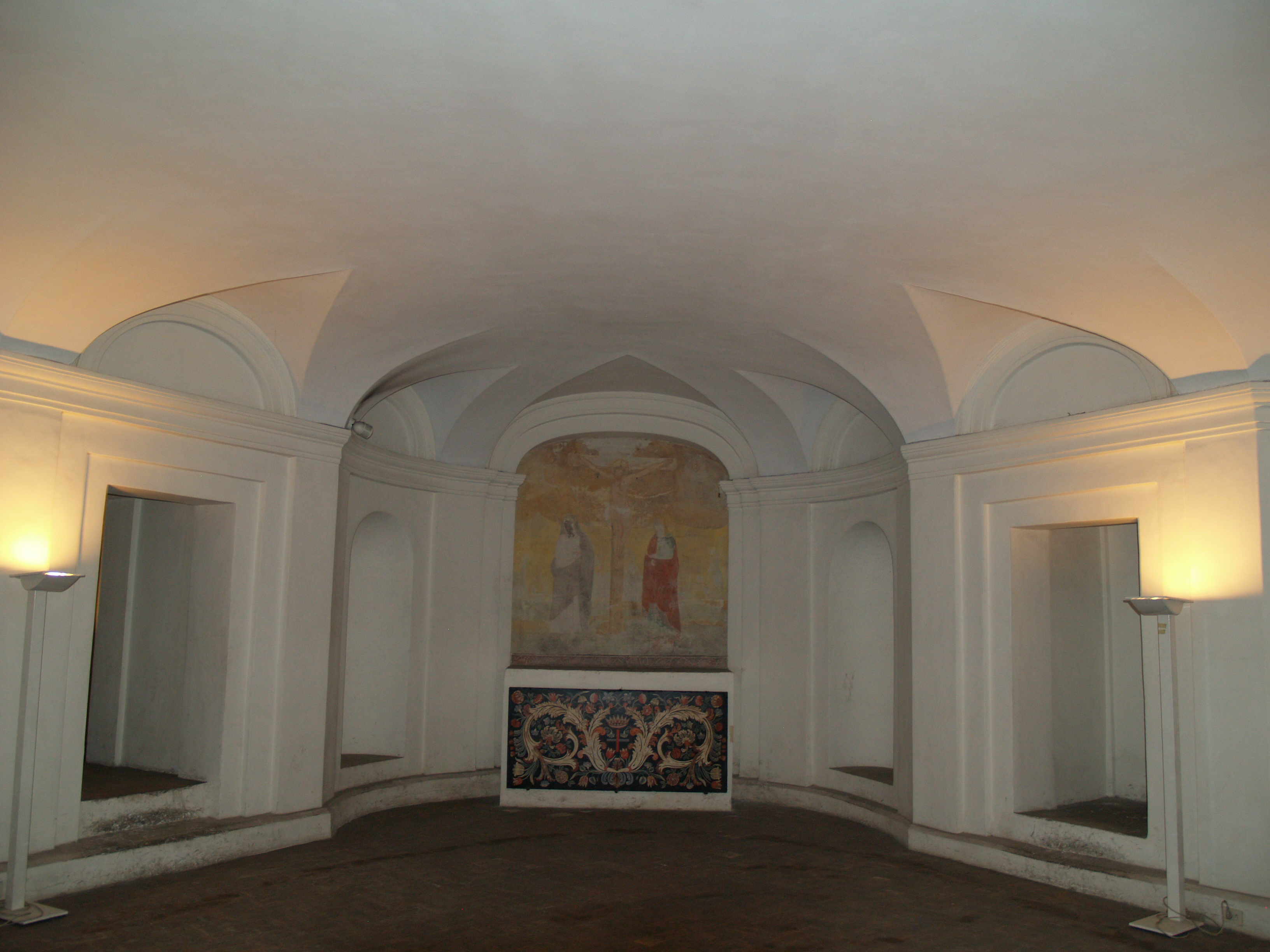 San Carlo alle Quattro Fontane. Cripta.